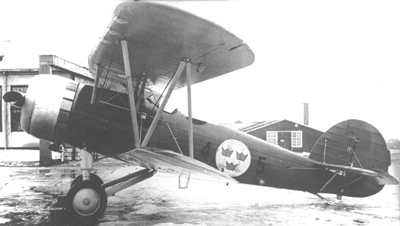 B 4B varianten av svenska Hawker Hart. Försedd med starkare motor och ny motorkopa.